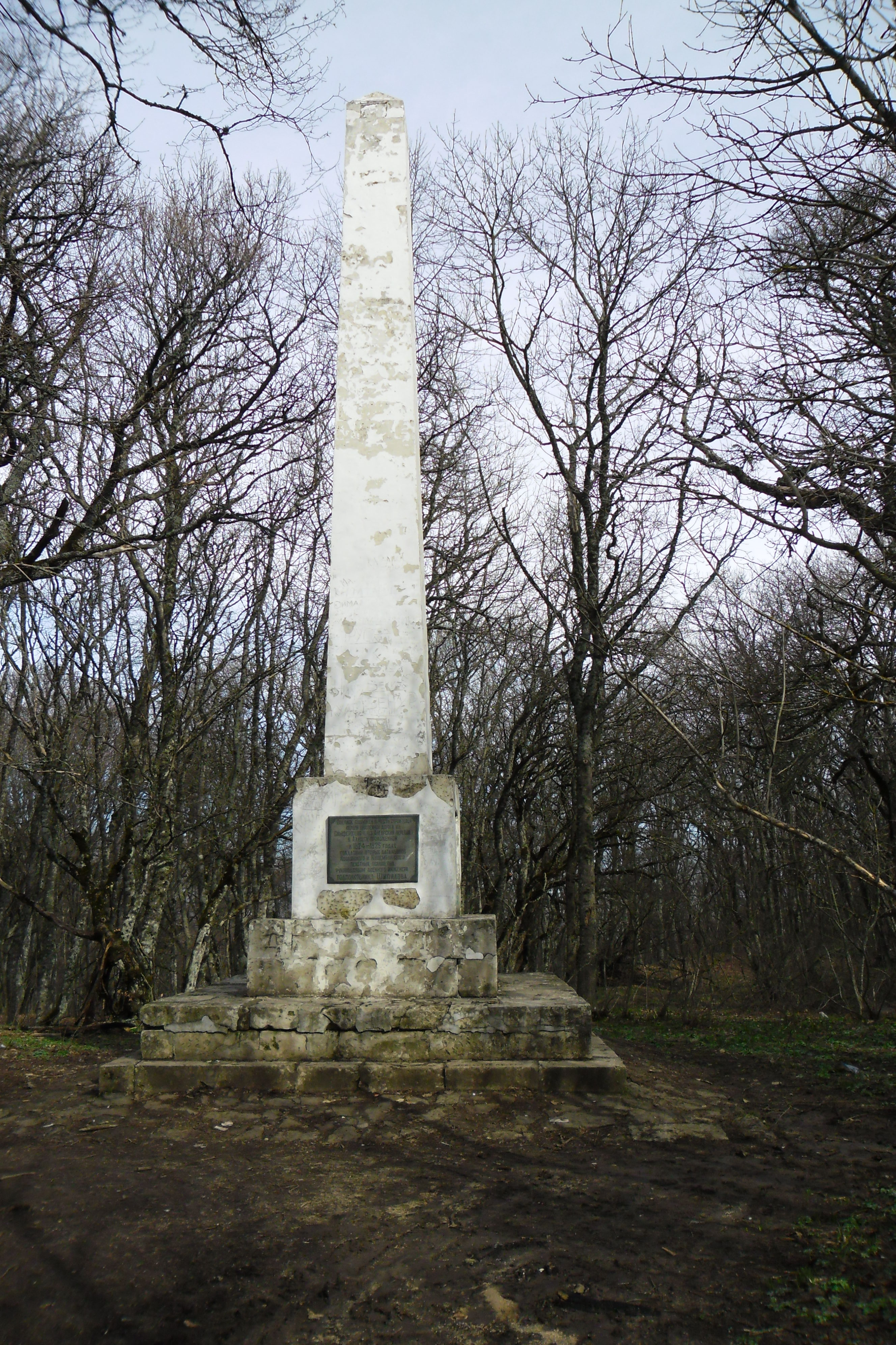 Фото